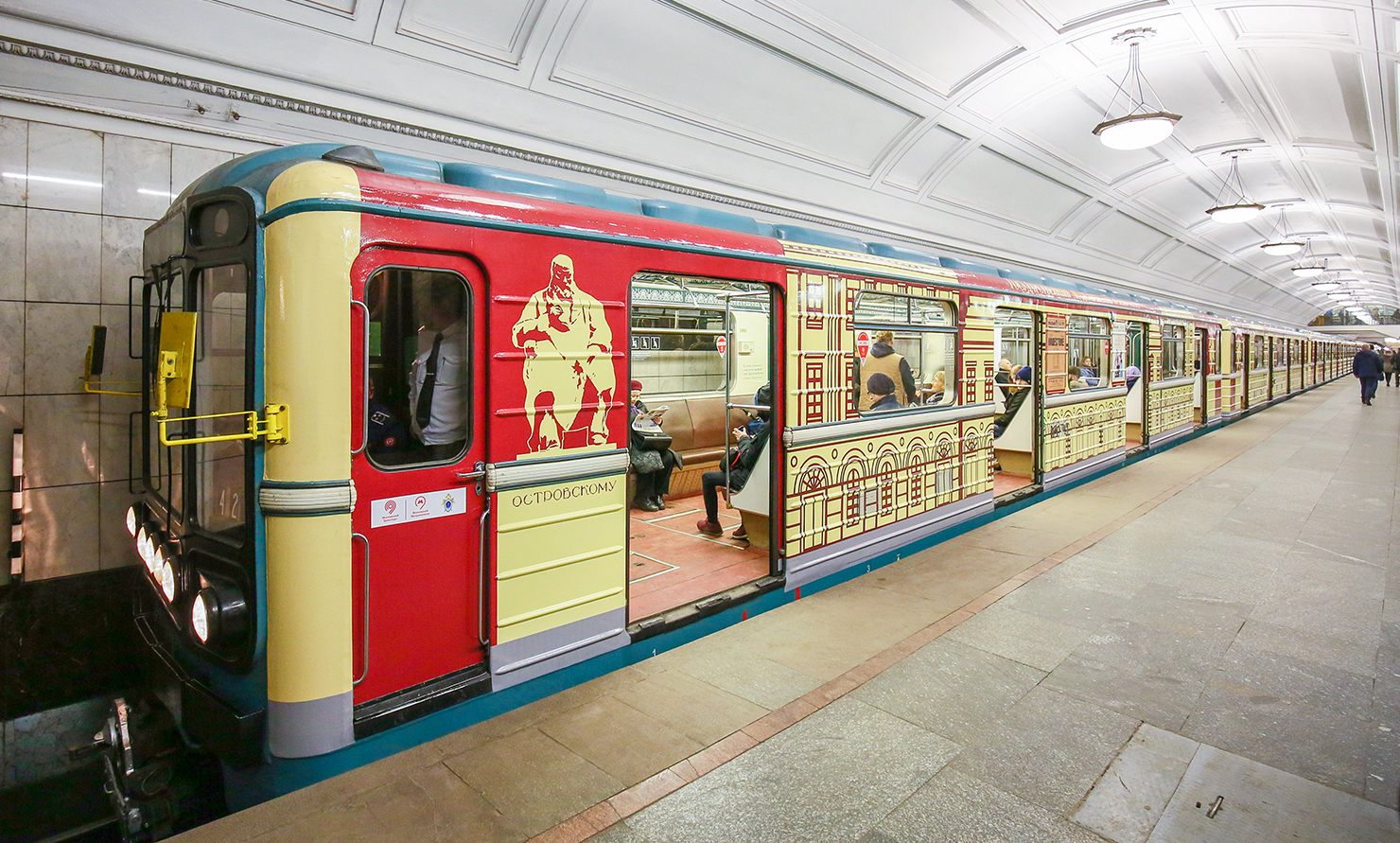 Поезд на станции «Белорусская»